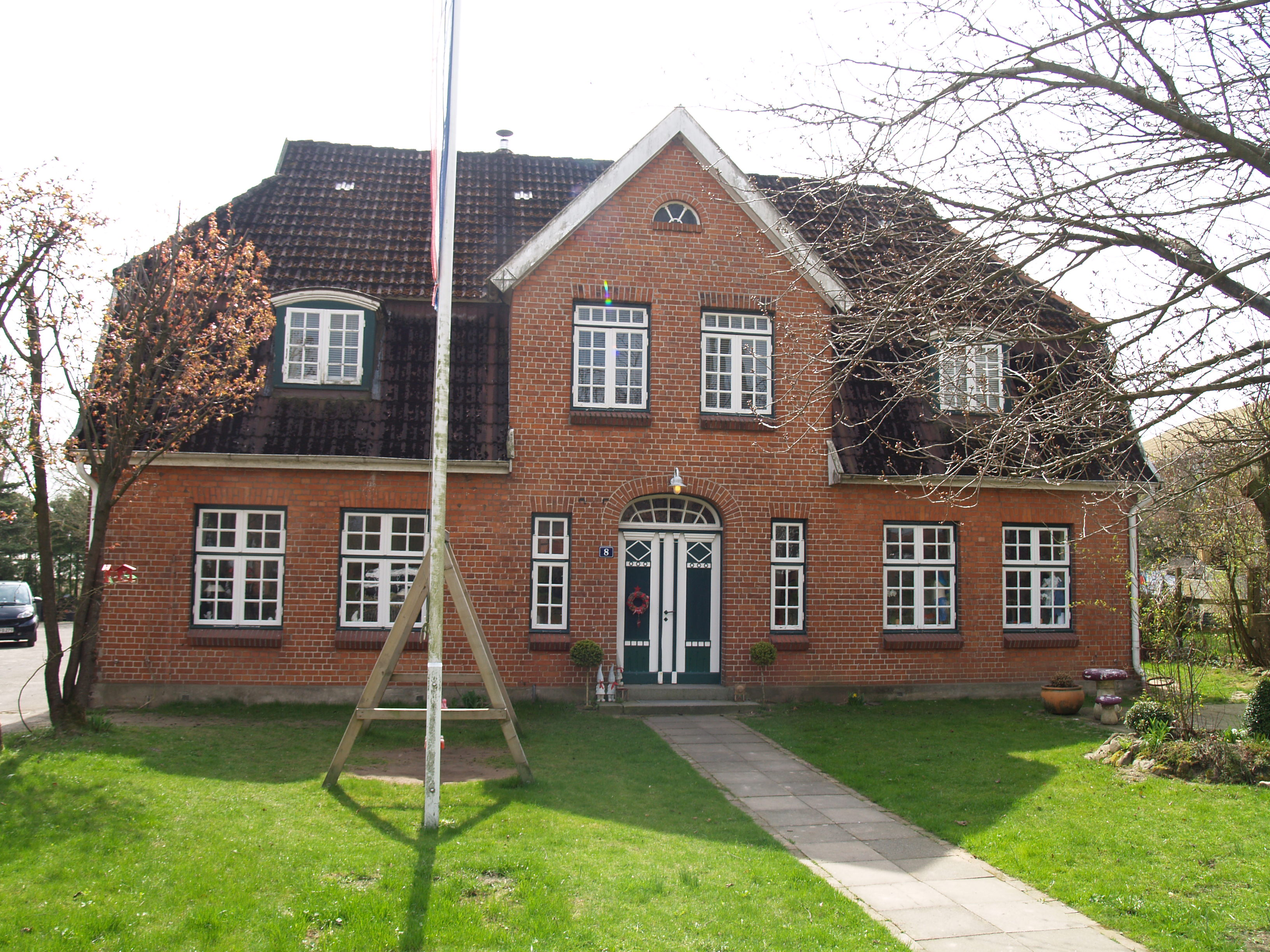 Bogenstraße 8, Worth, Herzogtum Lauenburg, Deutschland